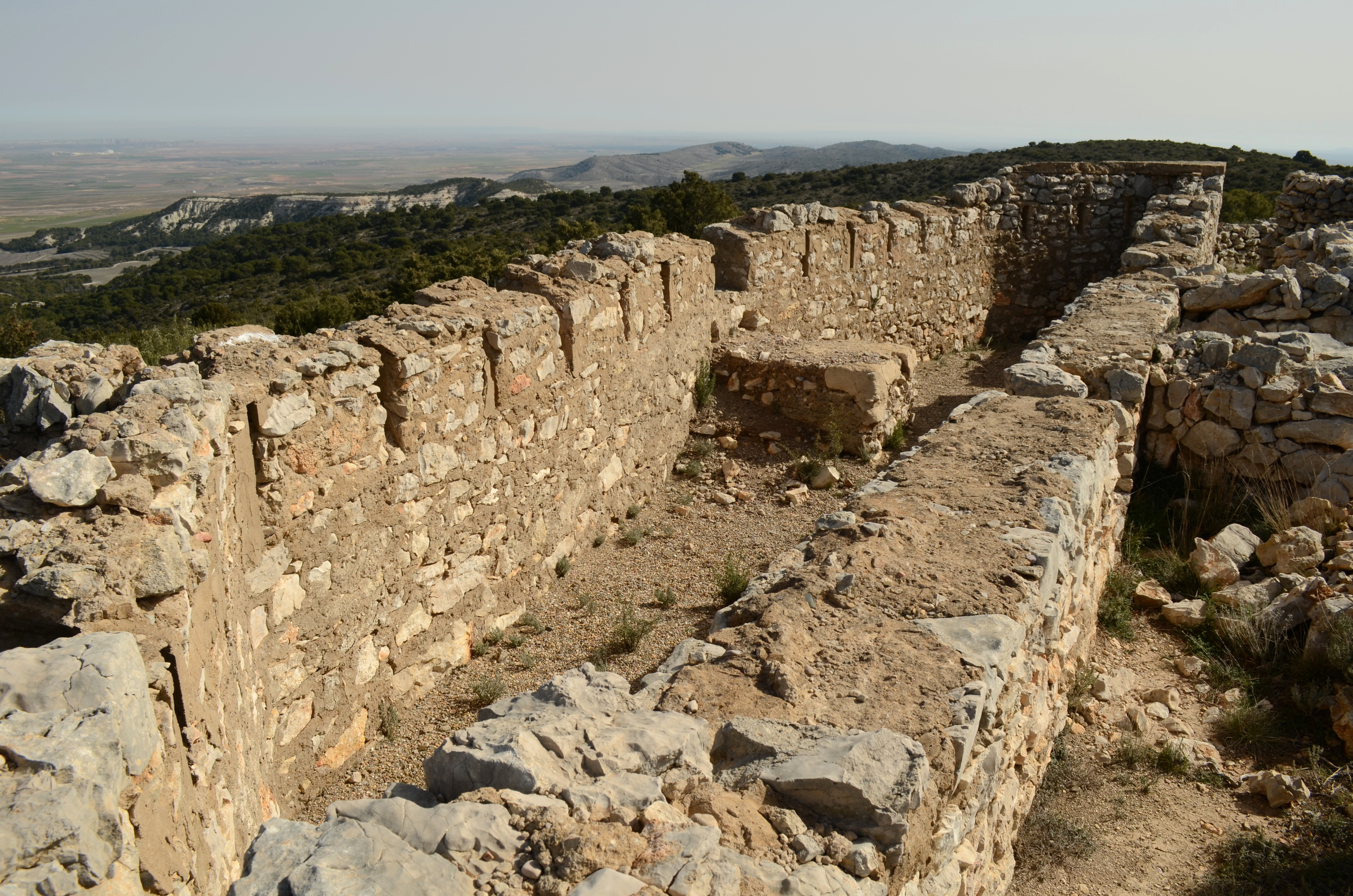 Vértice de Sierra Gorda (Fuendetodos, España). Fortín semicircular construido entre 1936 y 1938.